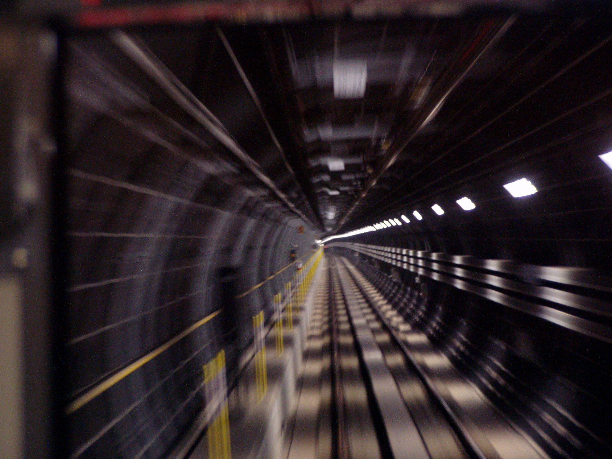 Osaka. LIM metro tunnel